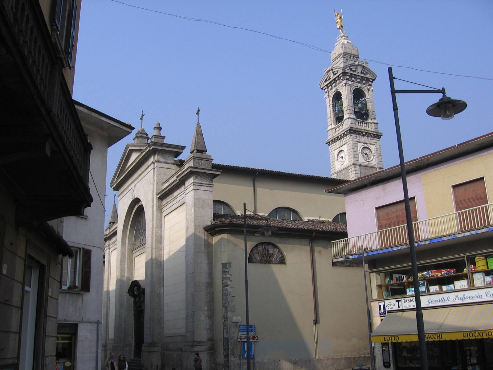 chiesa parrocchiale si sant'Ippolito. Gazzaniga, Bergamo, Italia